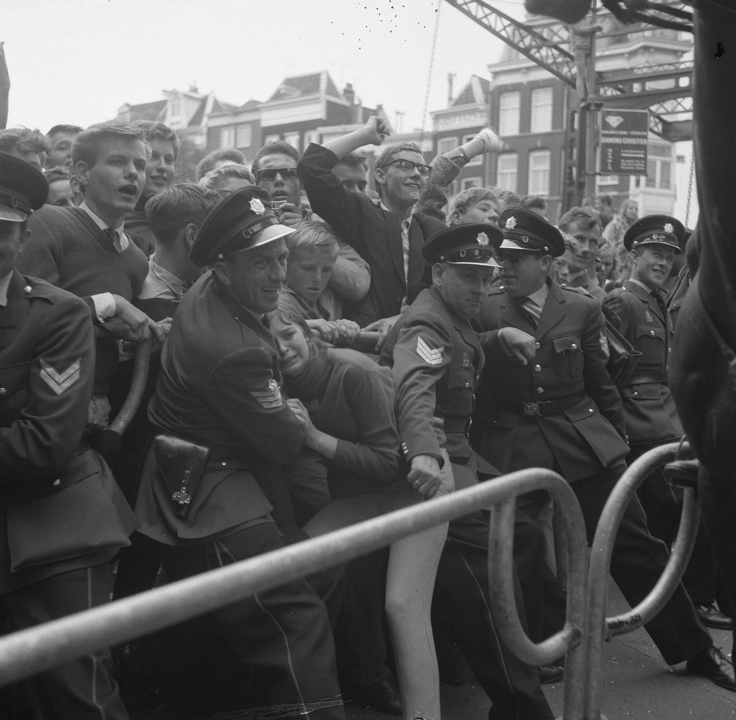 Collectie / Archief : Fotocollectie Anefo Reportage / Serie : [ onbekend ] Beschrijving : Beatles in Nederland, de politie had moeite publiek in bedwang te houden Datum : 5 juni 1964 Locatie : Amsterdam, Noord-Holland Trefwoorden : fans, politie, popgroepen, publiek Instellingsnaam : Beatles, The Fotograaf : Gelderen, Hugo van / Anefo Auteursrechthebbende : Nationaal Archief Materiaalsoort : Negatief (zwart/wit) Nummer archiefinventaris : bekijk toegang 2.24.01.03 Bestanddeelnummer : 916-5116